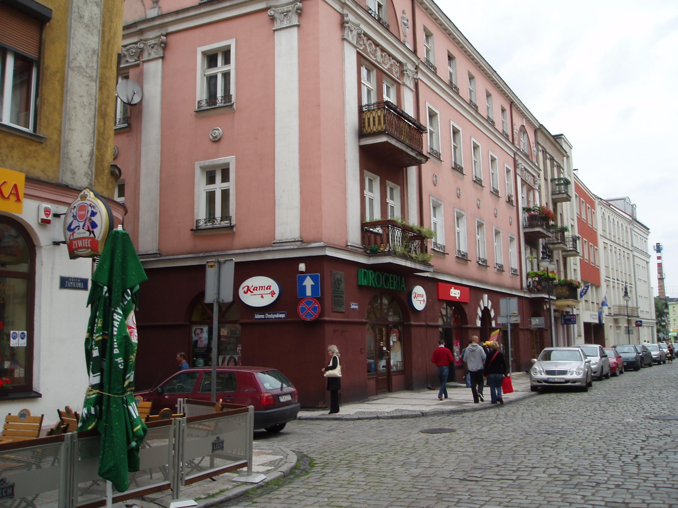 Kalisz, ul. Zamkowa 14 - kamienica ("Dom Ulrycha") z 1925 (zabytek nr 680/A)